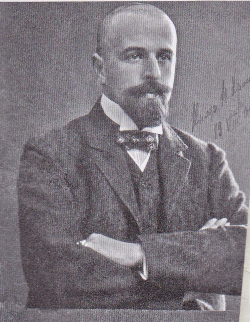 Князь Николай Дмитриевич Кропоткин, Лифляндский и Курляндский вице-губернатор, основатель курорта Зегевольд.